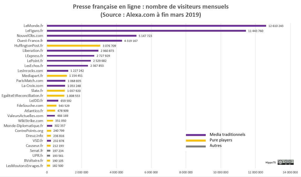 Presse française en ligne : nombre de visiteurs mensuels Média traditionnels et pure players (Source : à fin mars 2019)